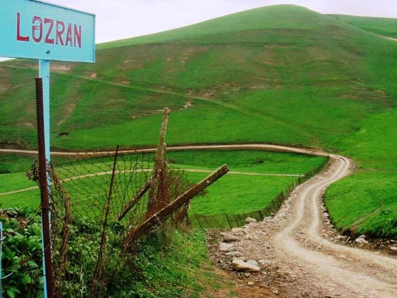 kənd mənzərəsi